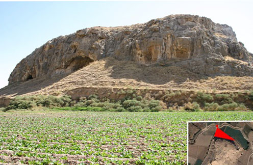 تصاویری از قصرابونصر